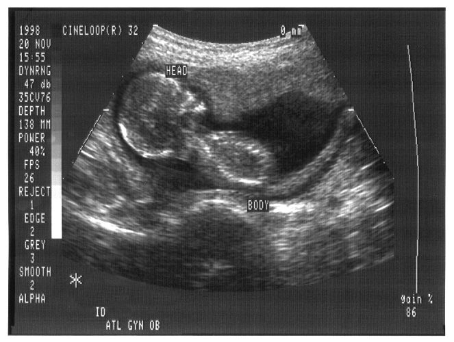 Ultraschallbild eines vier Monate alten Fötus